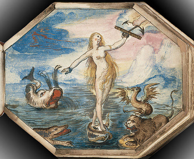 Volgens de Griekse dichter Hesiodos werd de godin der liefde Venus (in de Griekse mythologie Aphrodite genaamd) geboren uit het schuim der zee. Zie ook: Image uploaded on 02-10-2013 from the Flickr stream of the Royal Library, The Hague (Koninklijke Bibliotheek, KB, national library of the Netherlands)